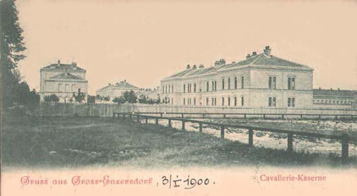 k.u.k. Kavalleriekaserne in Groß-Enzersdorf